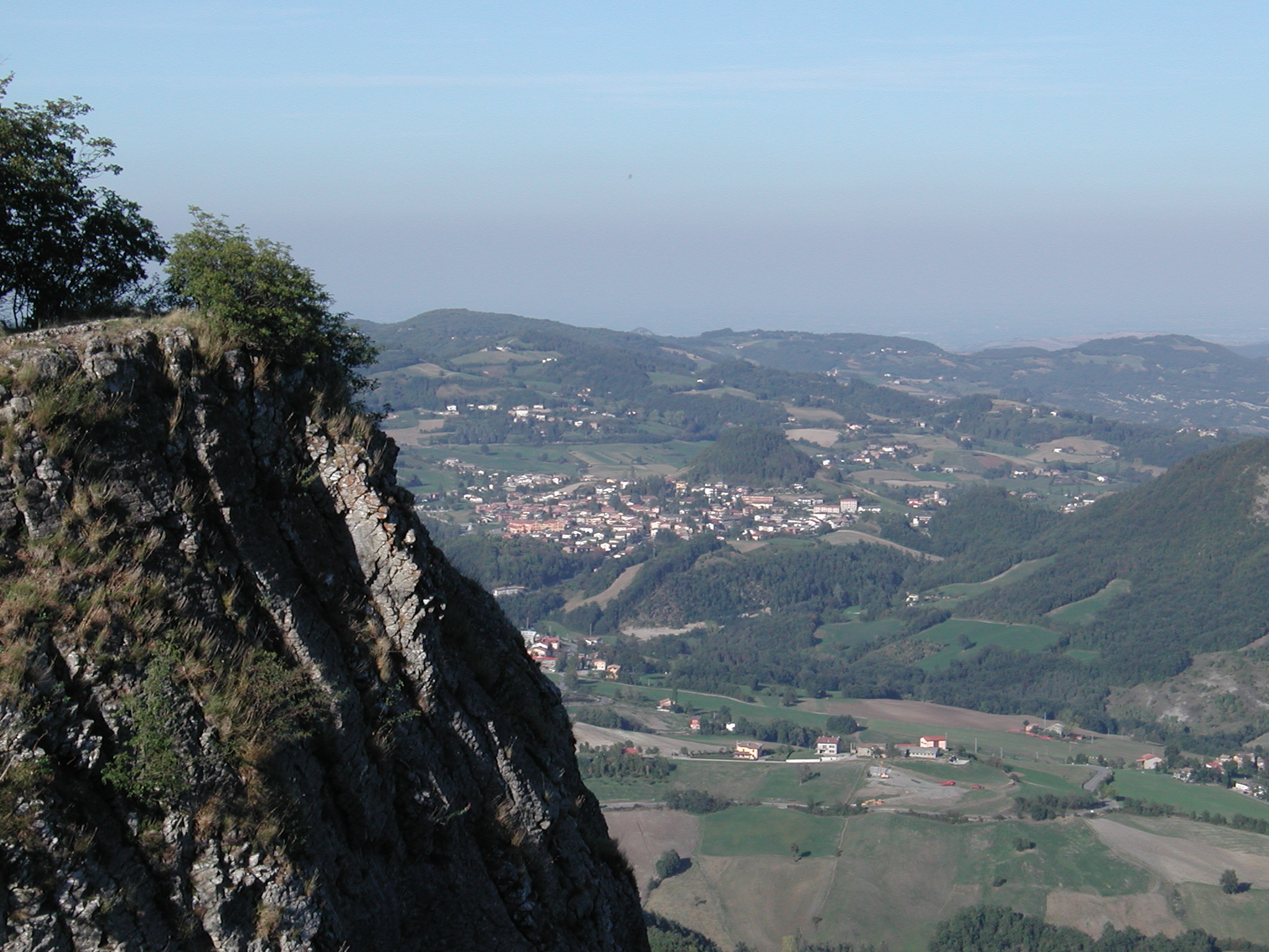 Felina dalla Pietra di Bismantova